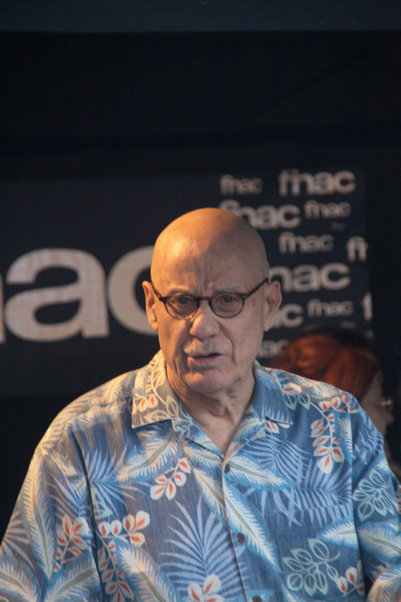 Signatura de llibres en la Diada de Sant Jordi-2015 a Barcelona